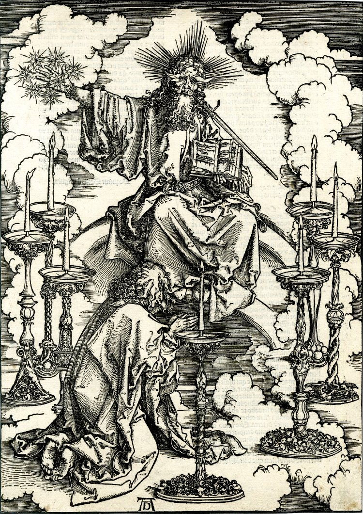 St John's vision of the seven candlesticks